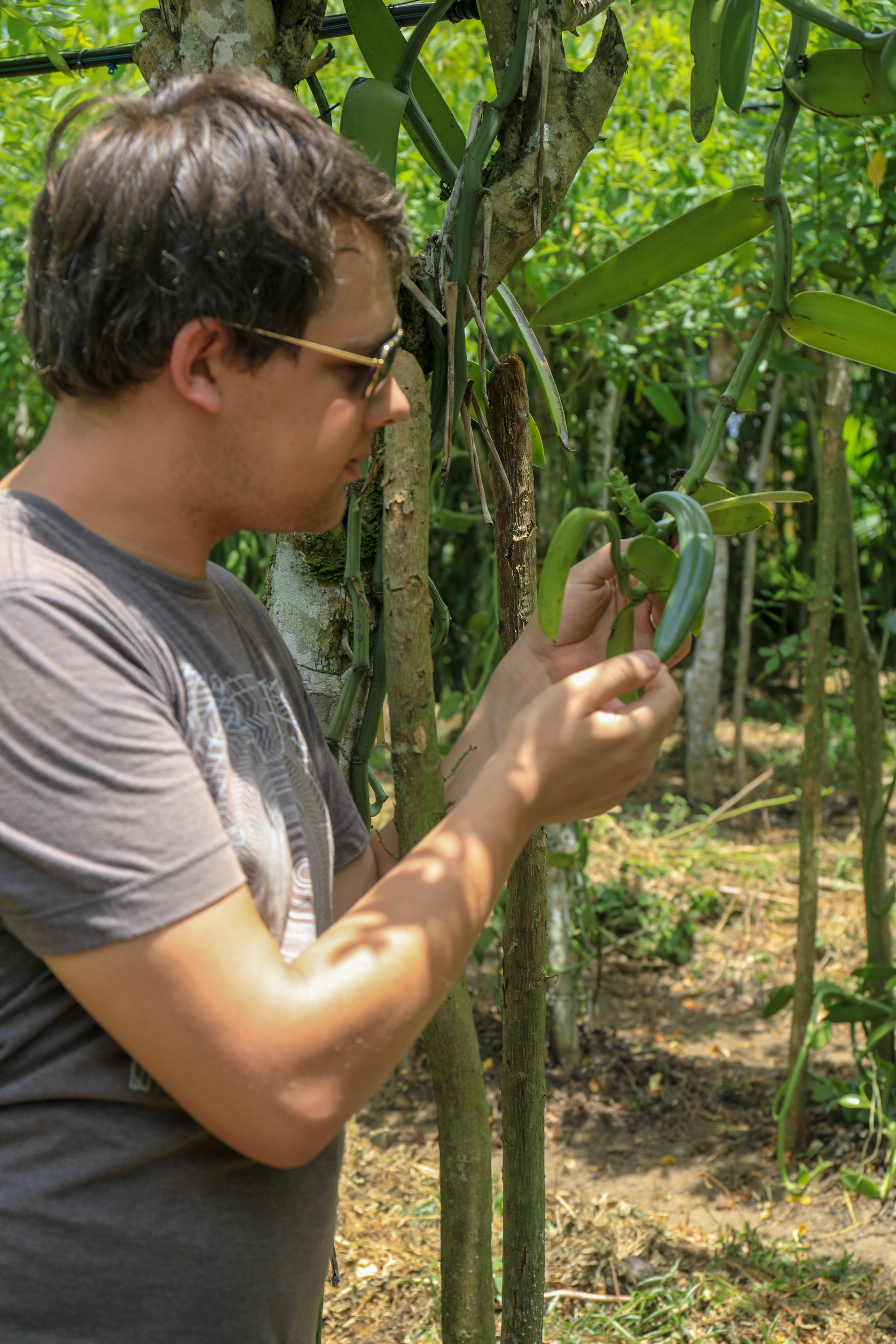 Gousses de Vanille sur son pied - Plantation de vanille - Lien pour licence